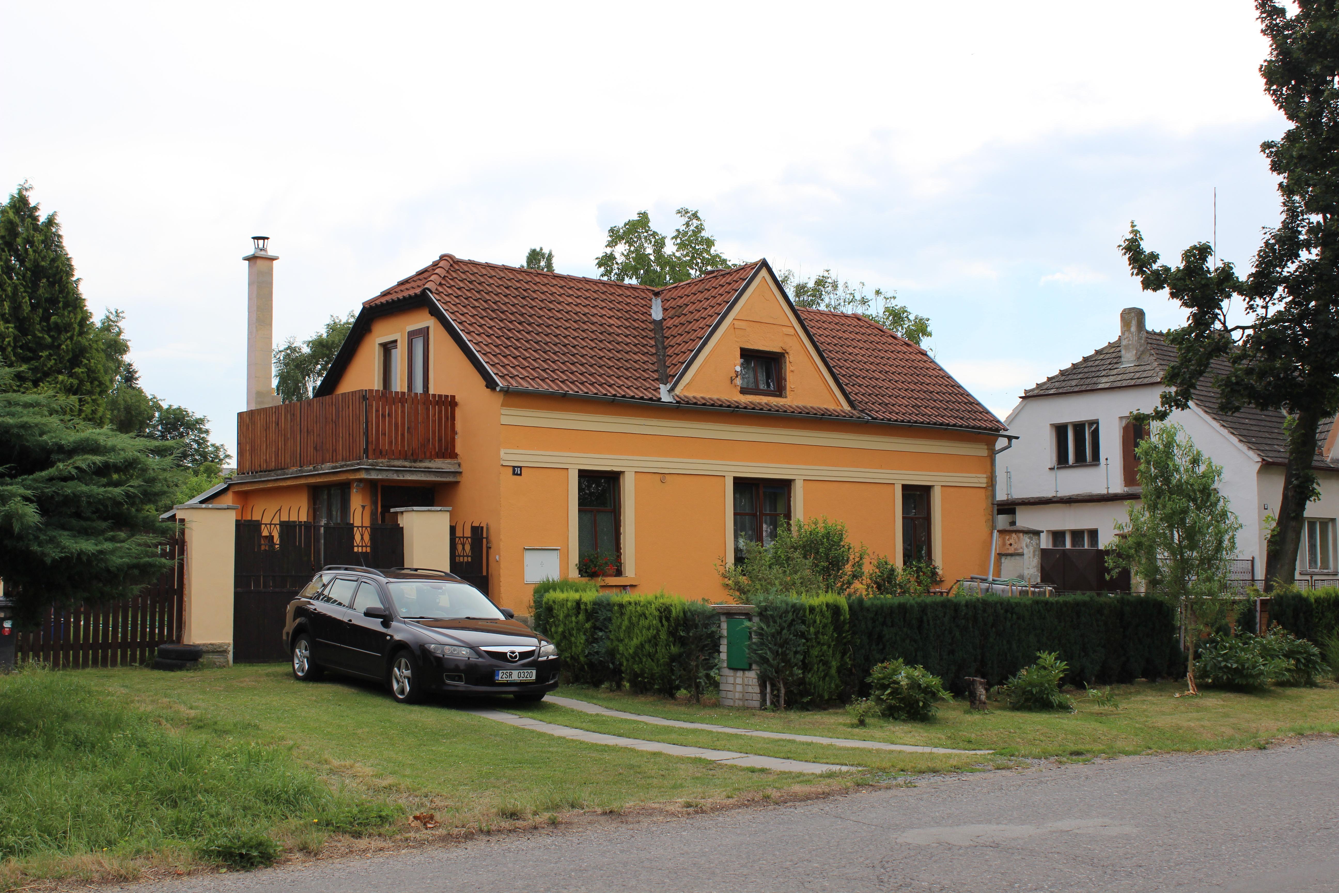 Dům číslo 76 v Sedlci v mladoboleslavském okrese.